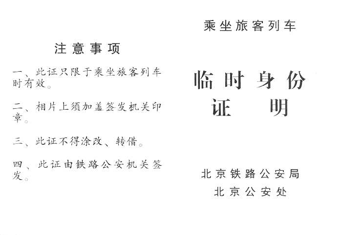 乘坐旅客列车临时身份证明，北京铁路公安局北京公安处制